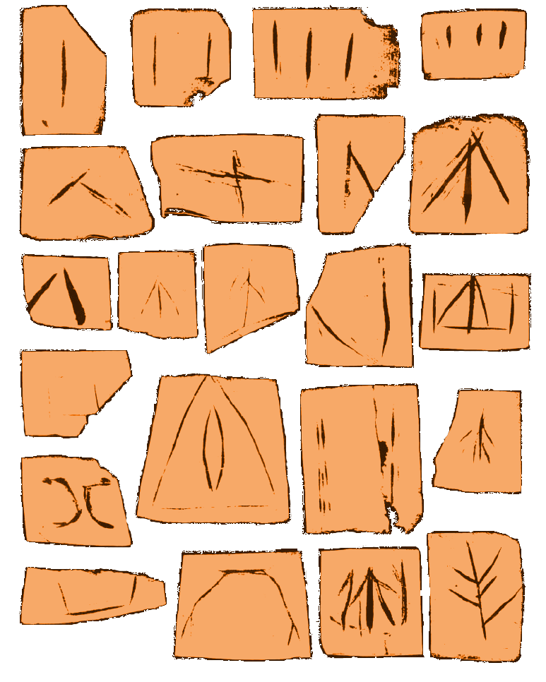 偃师二里头遗址三期陶纹汇集。拓片资料出自《偃师二里头1959年~1978年考古发掘报告》。